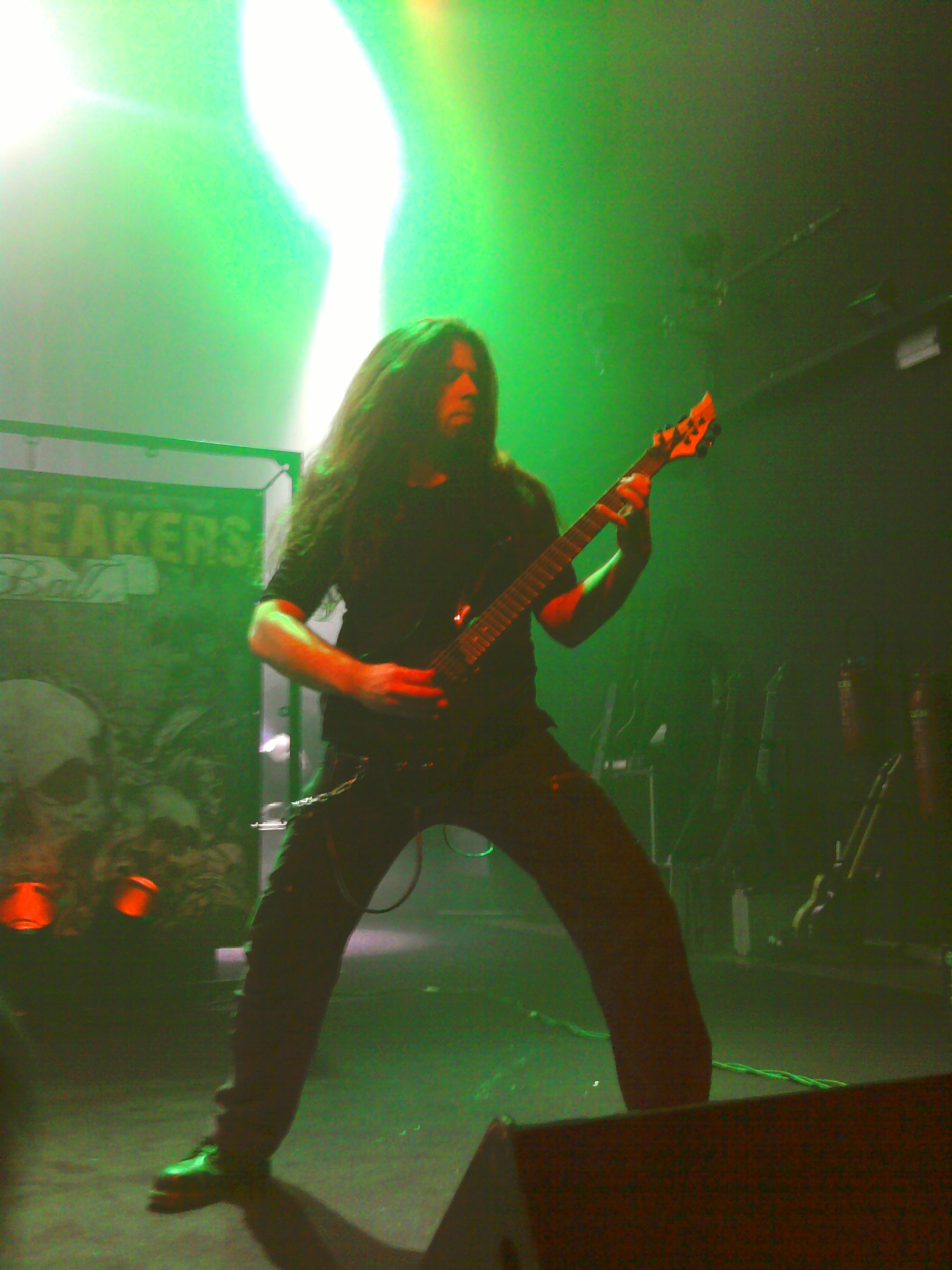 Un des guitaristes d'Equilibrium en concert à la Laiterie, Strasbourg - janvier 2011. Neckbreakers Ball